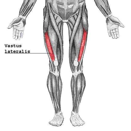 Vastus lateralis är en del av skelettmuskeln quadriceps och sitter i framsidan av låret. Bildbearbetning: Användare:Chrizz Kategori:Skelettmuskler